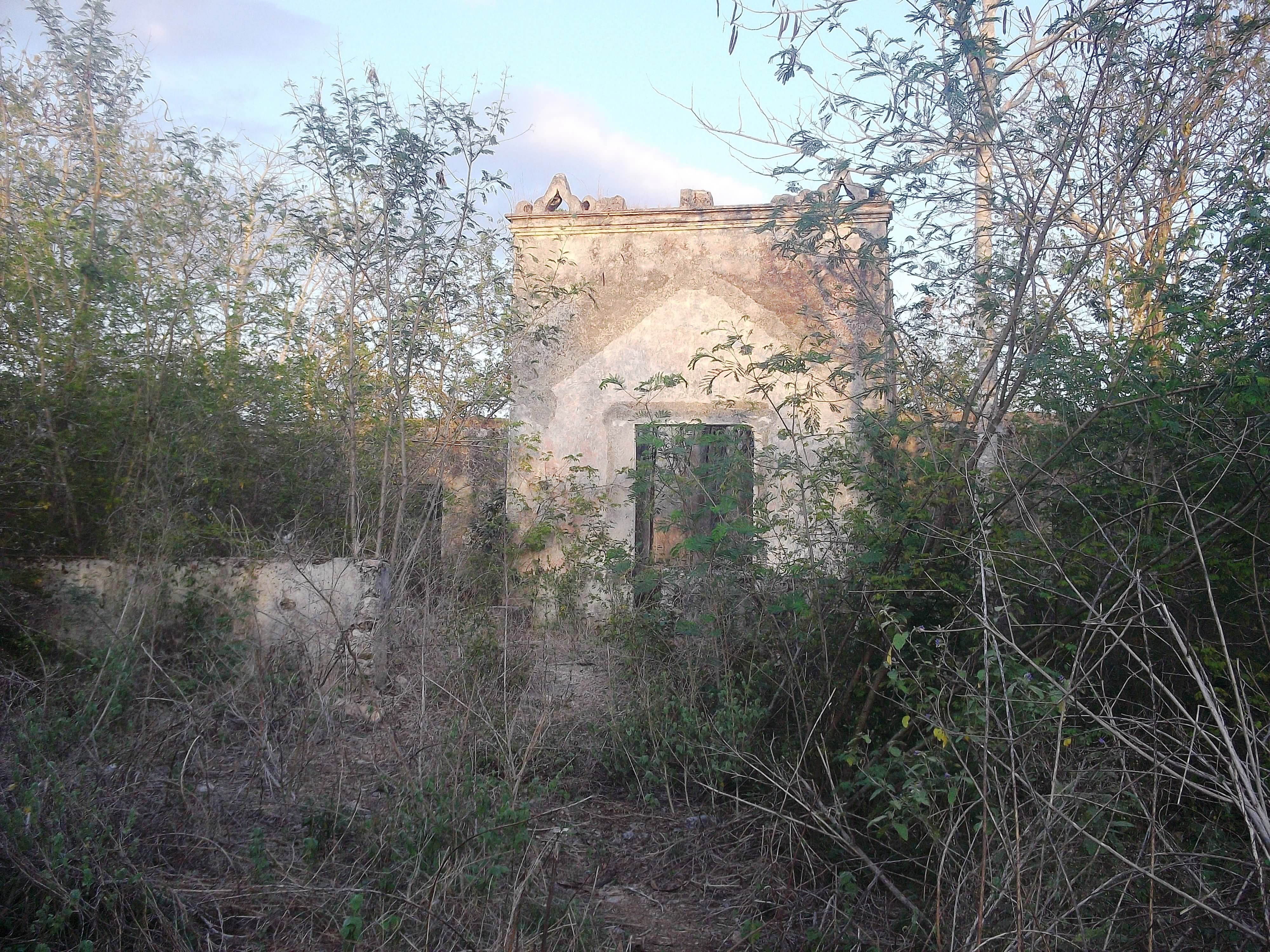 Capilla de la exhacienda San Pedro Cholul, Yucatán.